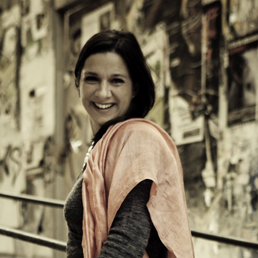 danny lemphi, Marseille 2011